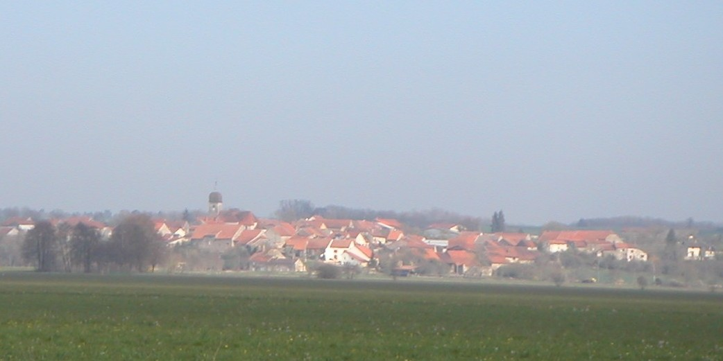 le village de Percey-le-Grand vu depuis la prairie de Peigne.